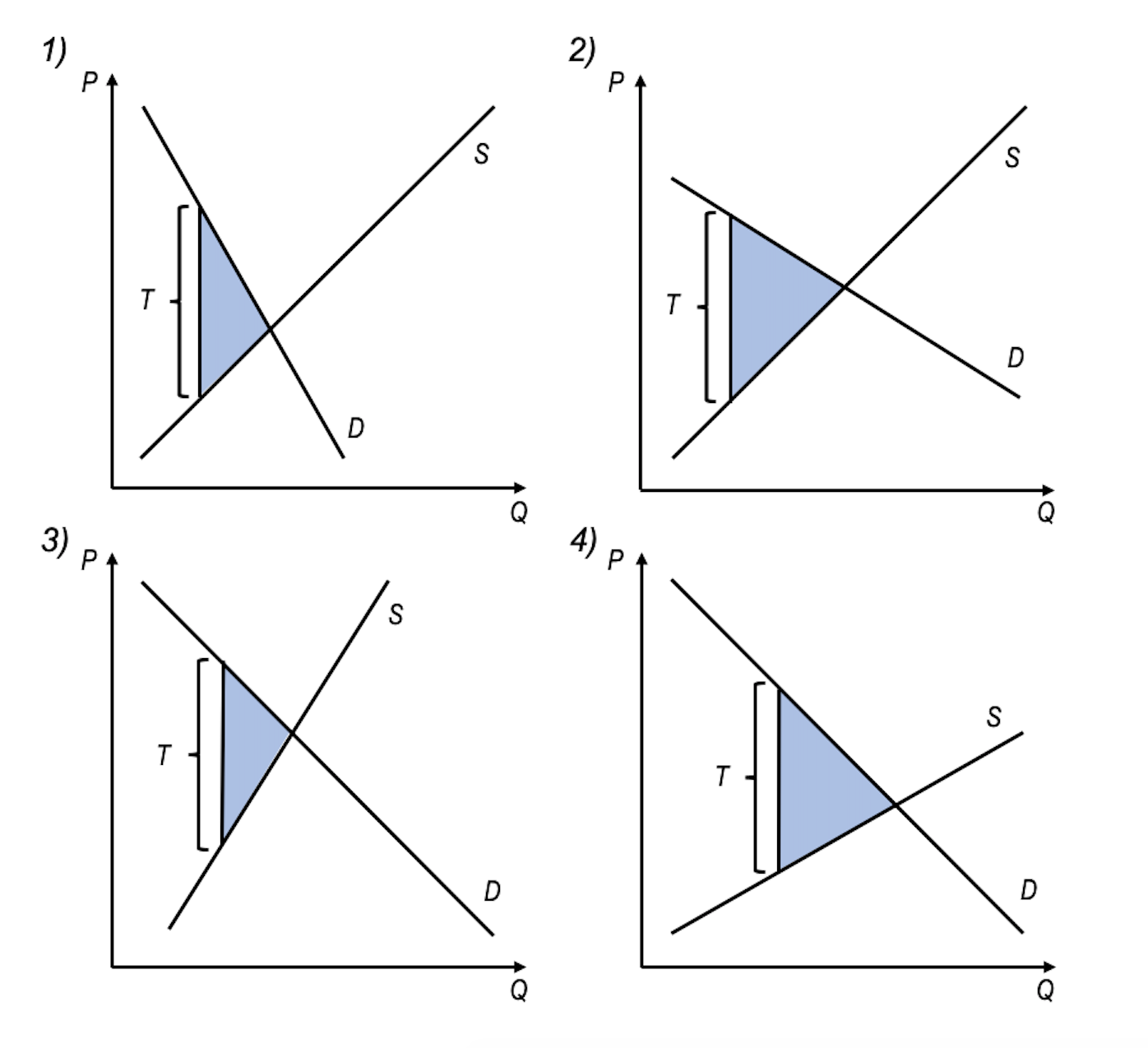 Wpływ elastyczności popytu i podaży na zbędną stratę społeczna